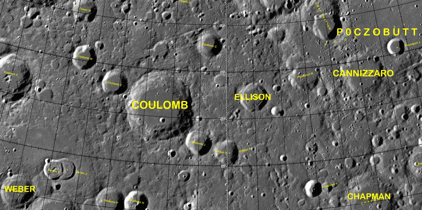 Cráter lunar Ellison. Localización. (Imagen LROC)